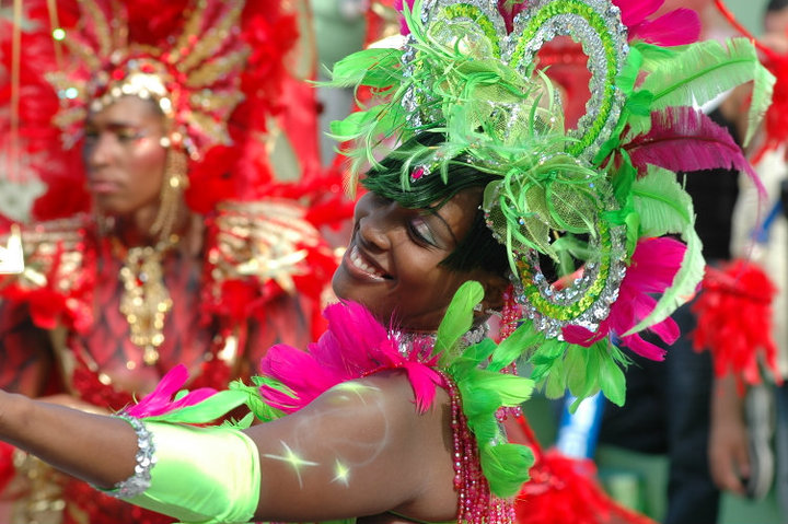 Carnaval de Saint-Martin